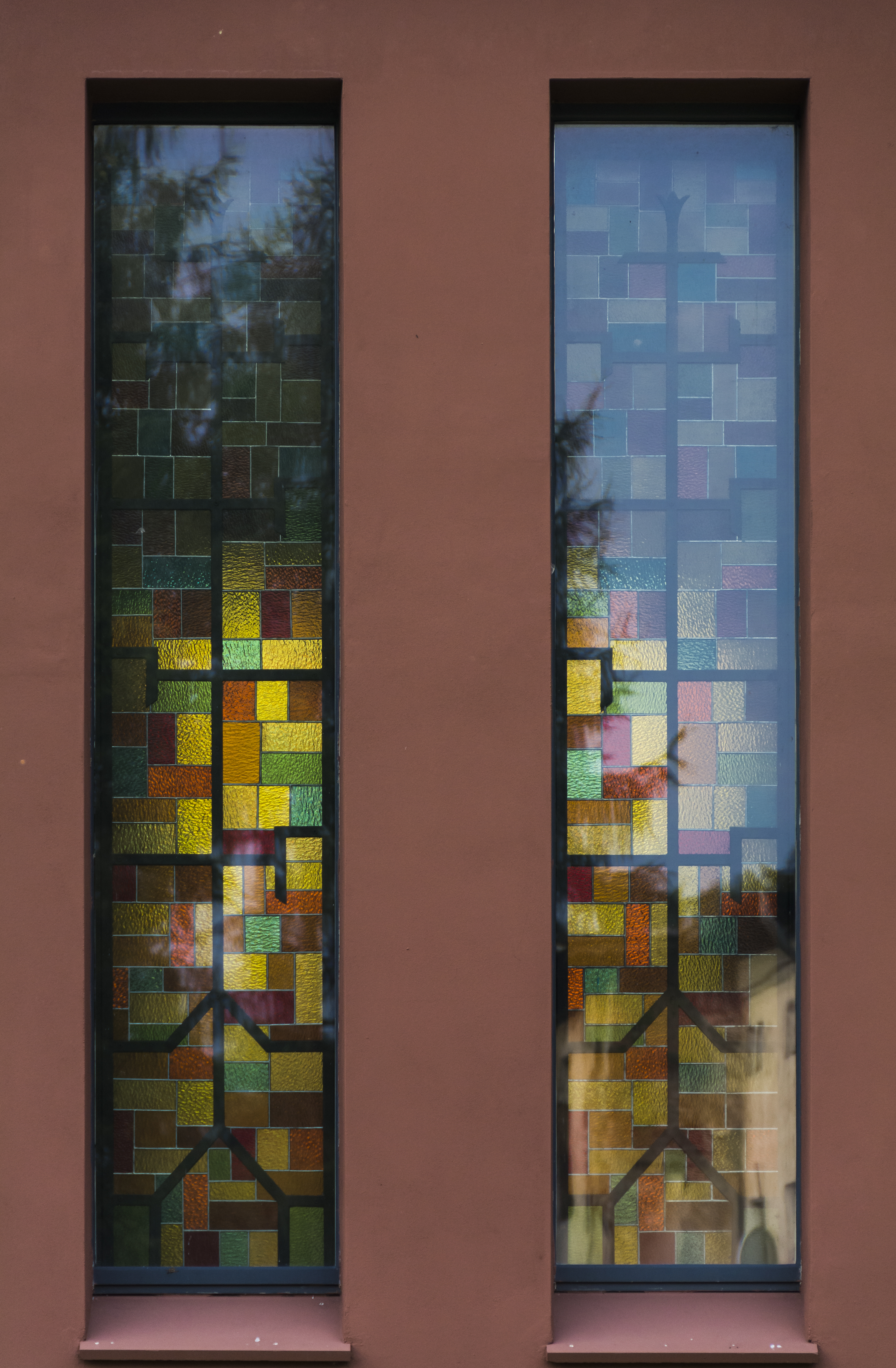 Ludwikowice Kłodzkie, kościół ewangelicki p.w. Błogosławieństwa Pańskiego, ob. Muzeum Ziemi Sowiogórskiej, 1929-1930